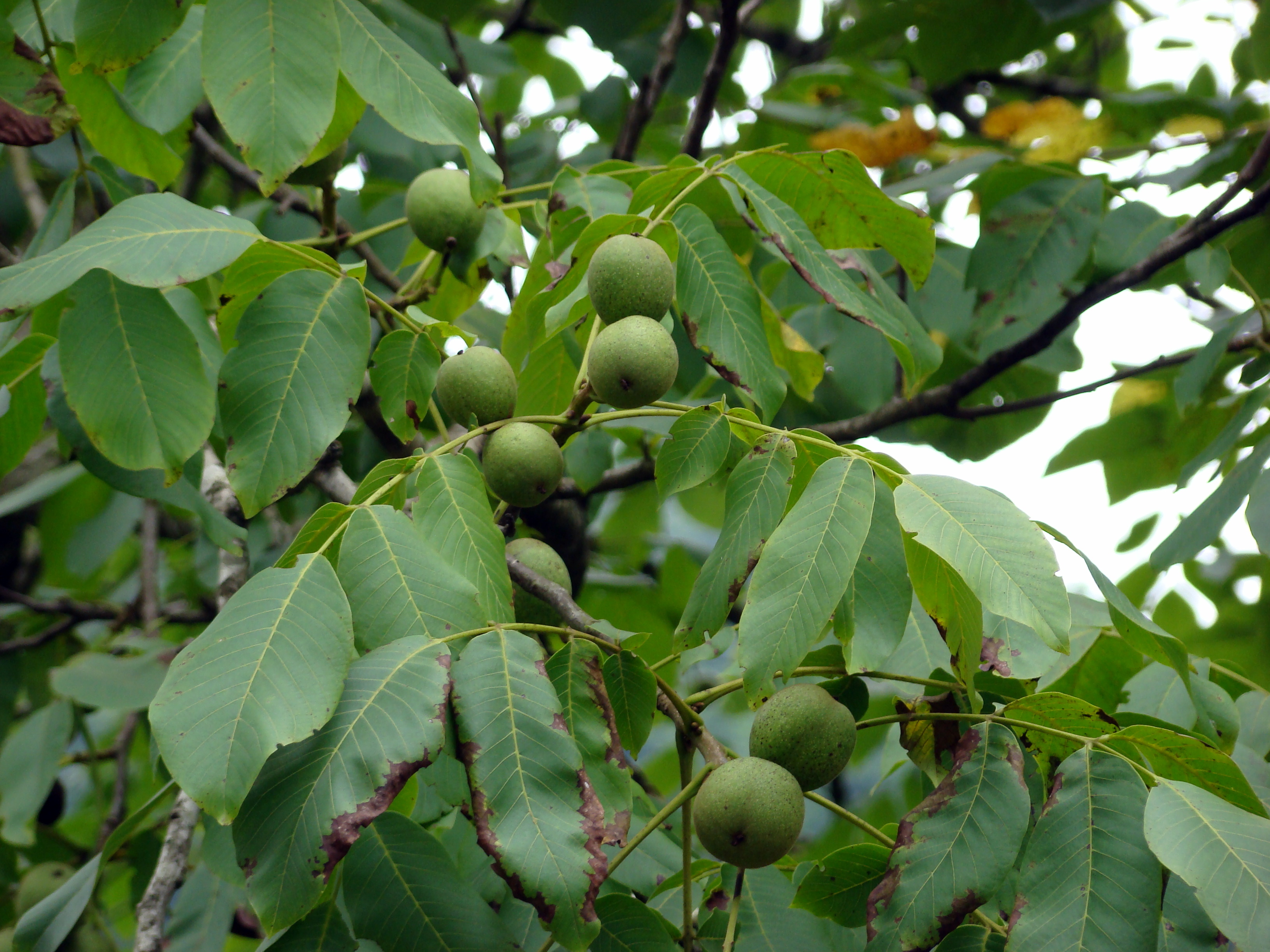 Juglans regia